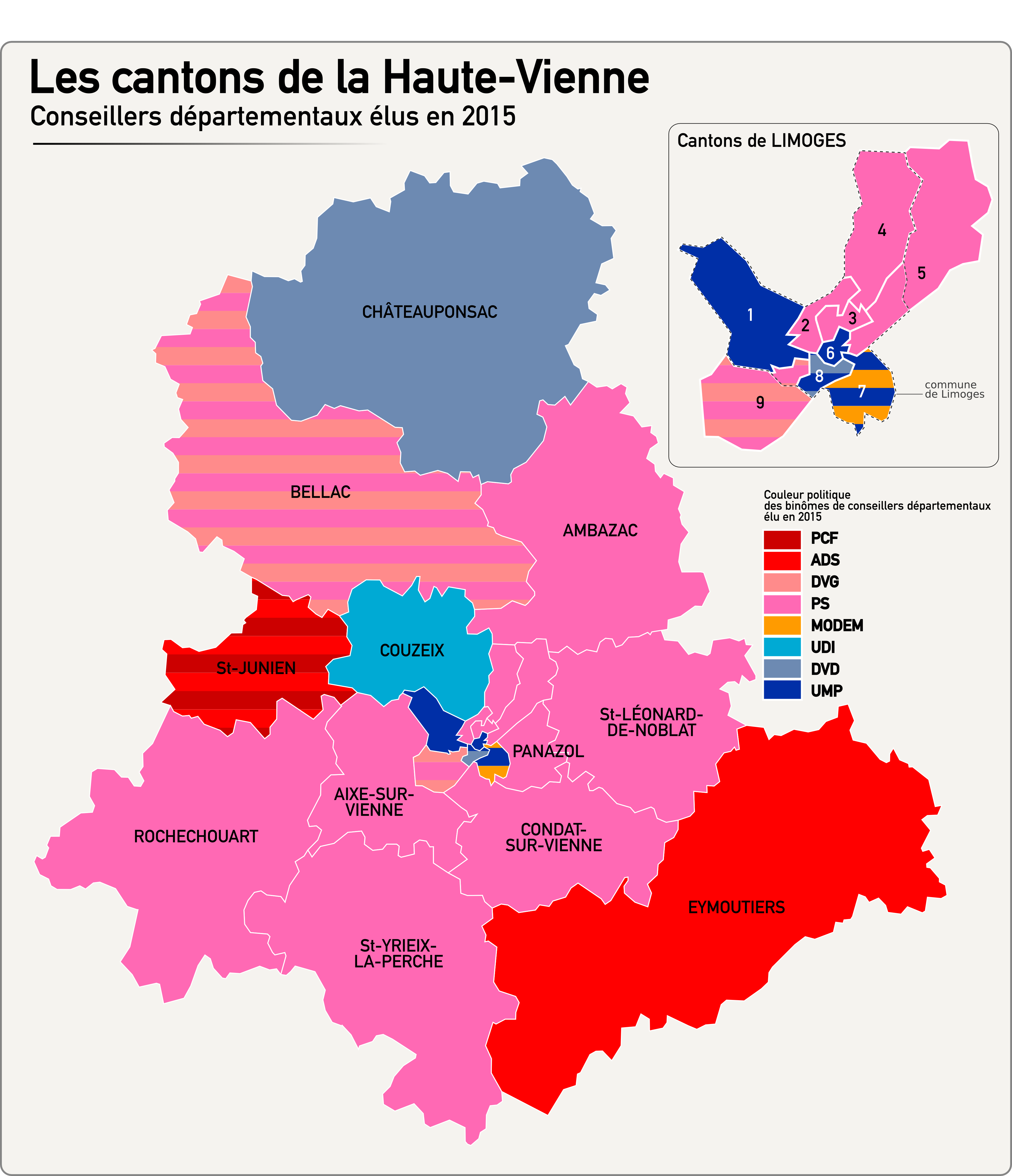 Carte des cantons de Haute-Vienne après les élections départementales de 2015.